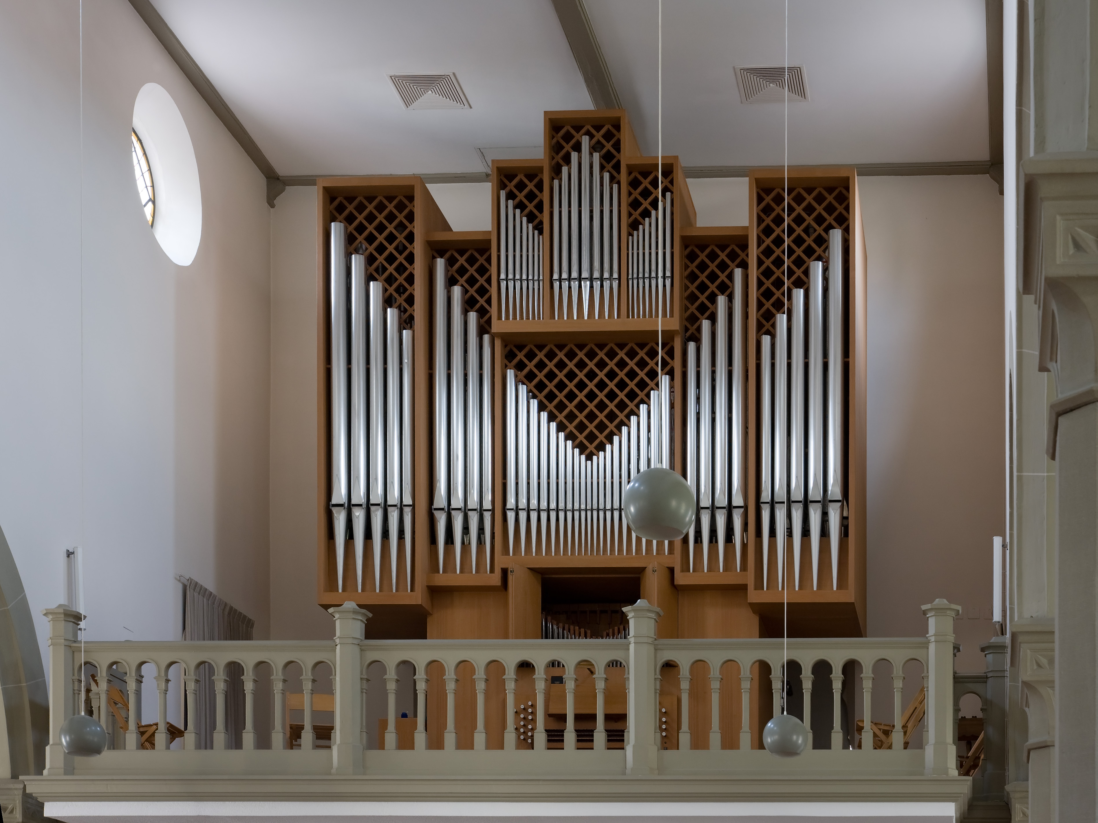 Orgel der Kirche in OberentfeldenArchitekt Ferdinand Stadler